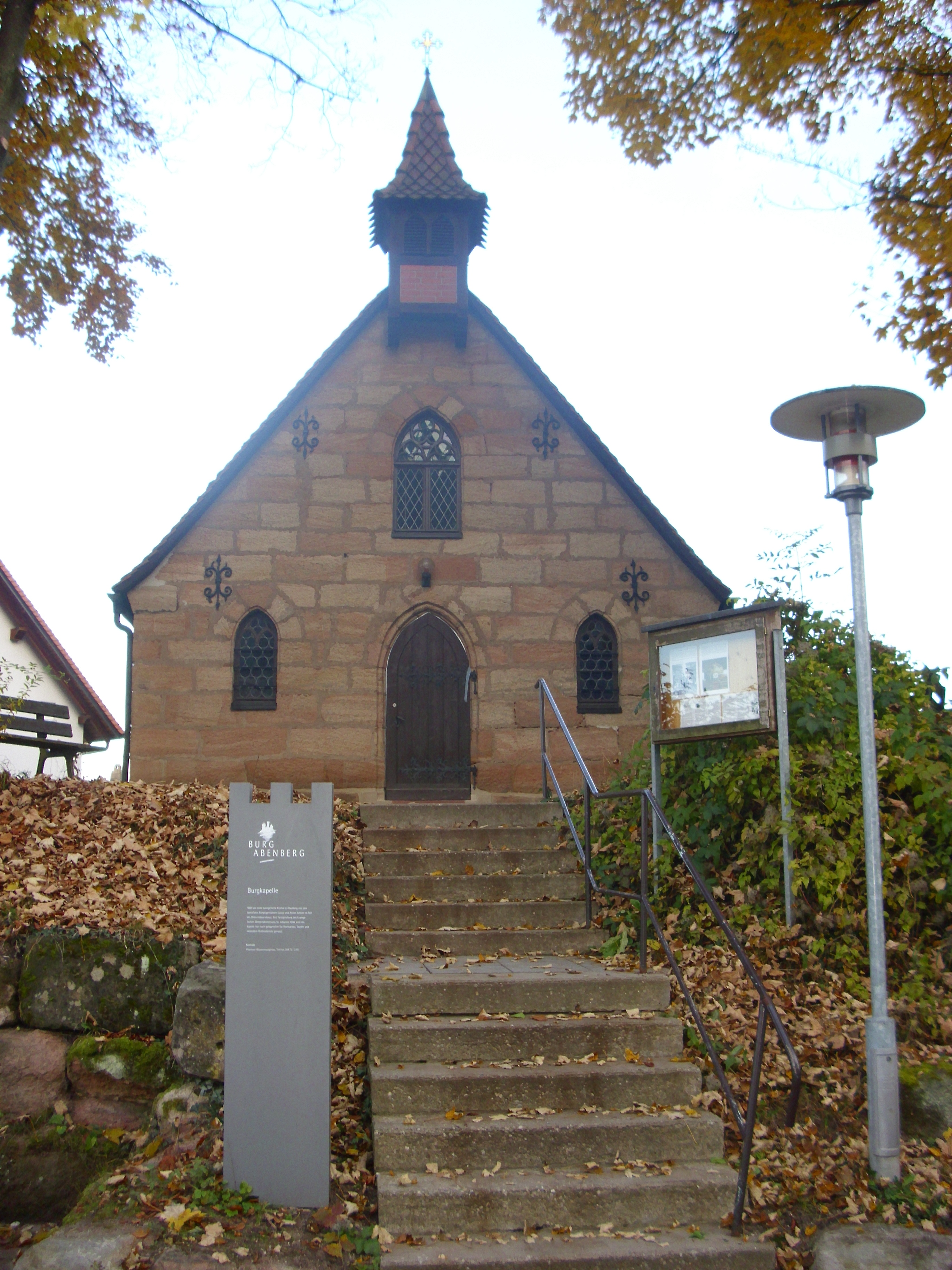 Westfassade der Abenberger Burgkapelle im Nordosten der Burg (An der Burgkapelle 10), Deutschland